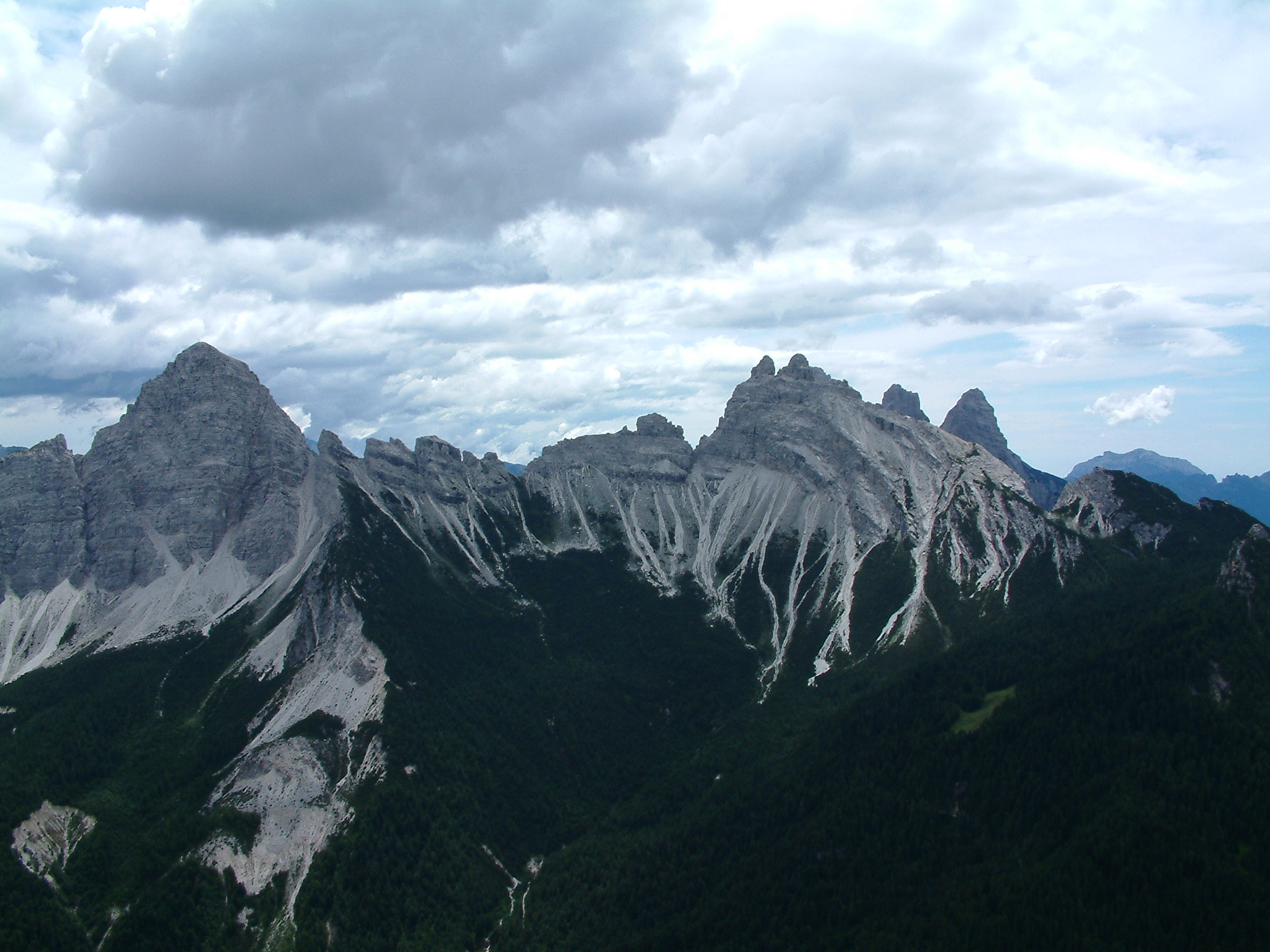 Links der Sassolungo di Cibiana, rechts die Sfornioi Nord, rechts dahinter halbverdeckt der Sasso di Toanella und die Rocchetta Alta di Bosconero